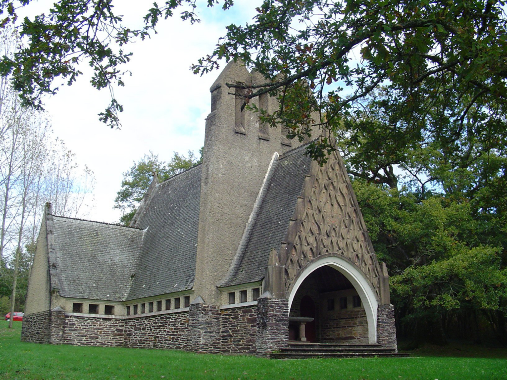 Chapelle de l'hermitage à Goven (France,35)